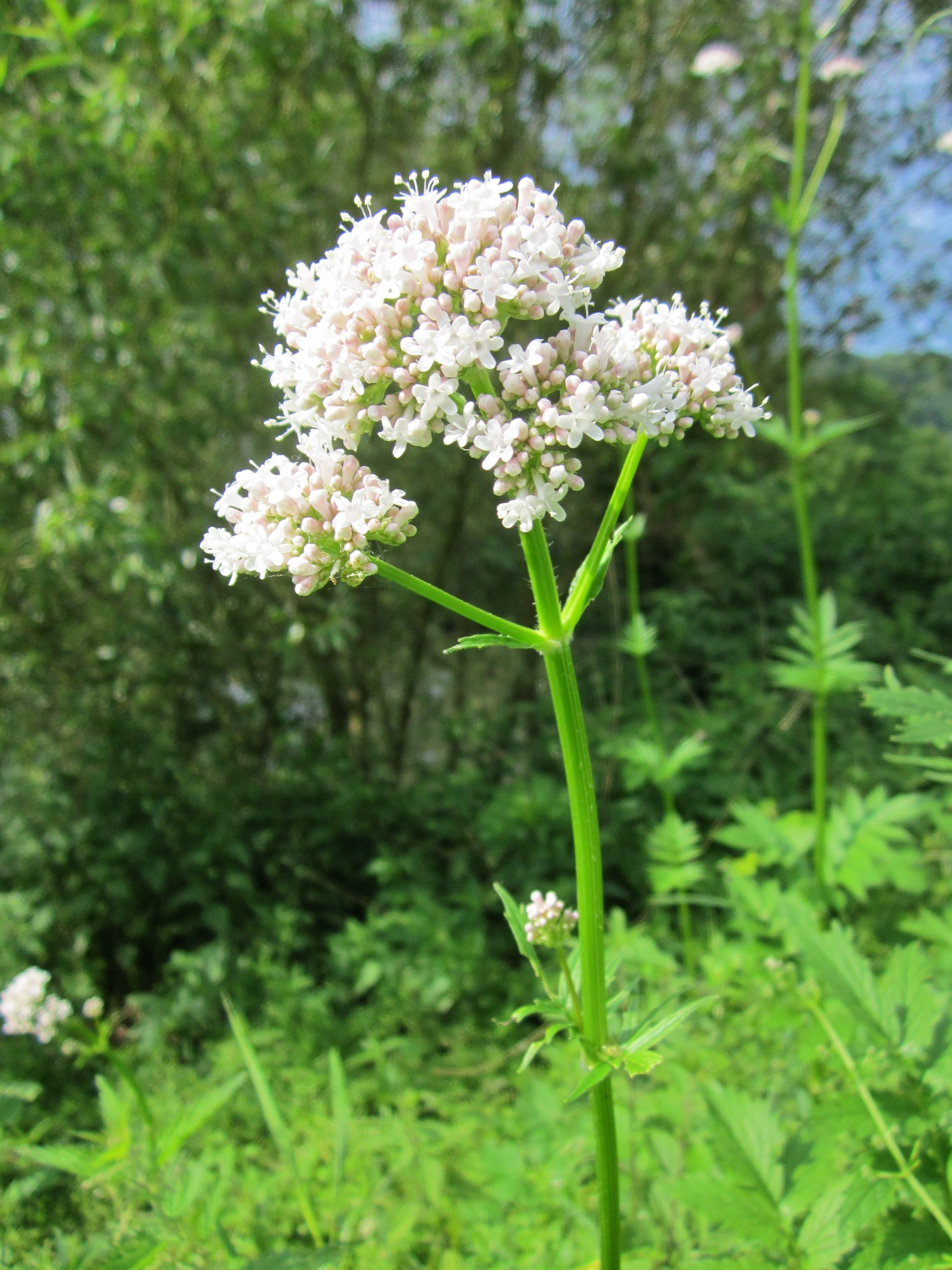 Baldrian (Valeriana officinalis) am Staden in Saarbrücken